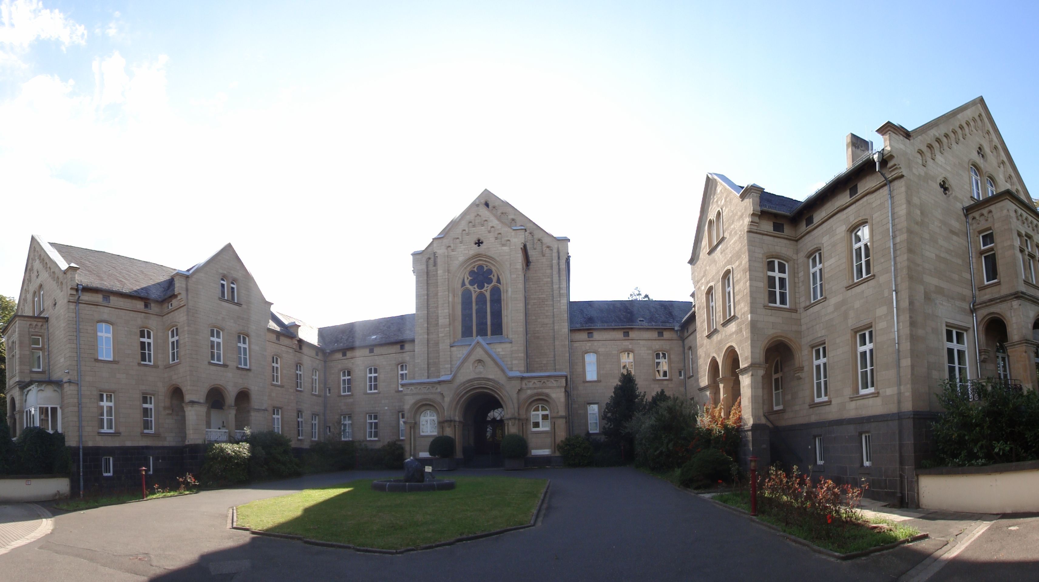 Das Kerngebäude mit Geschäftsführung und Verwaltung der Rhein-Mosel-Fachklinik Andernach